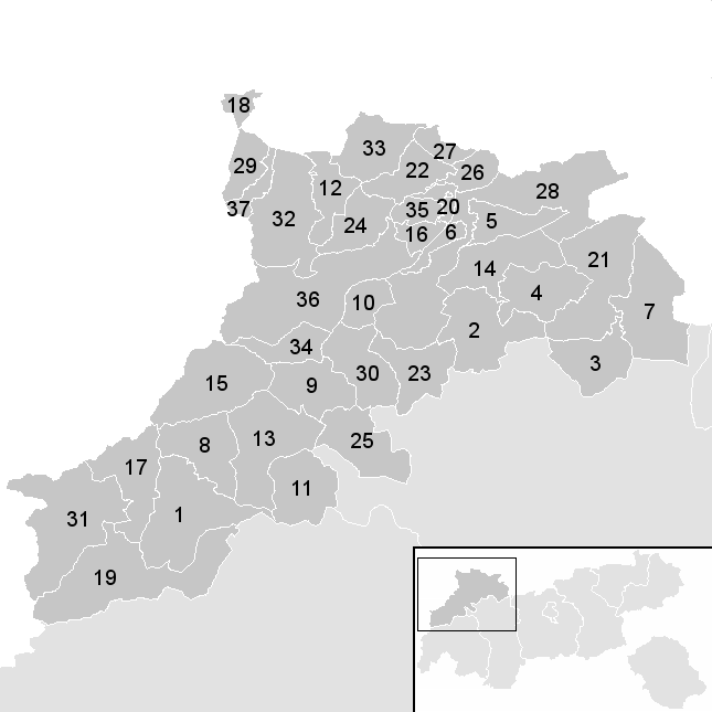 Leere Karte mit den Gemeinden im Österreichischen Bezirk Reutte